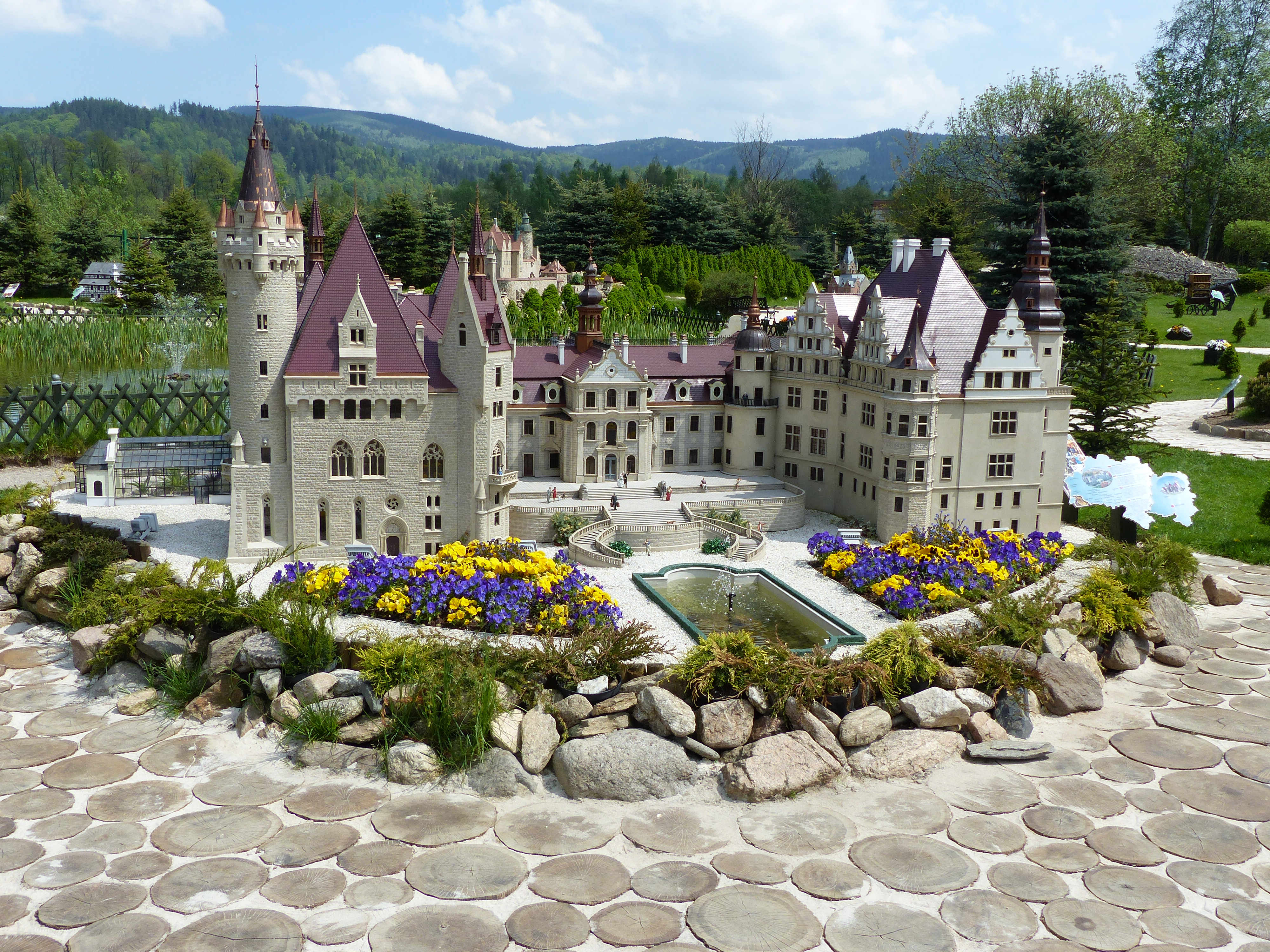 Miniaturen Park der Niederschlesischen Baudenkmäler in Kowary, Niederschlesien